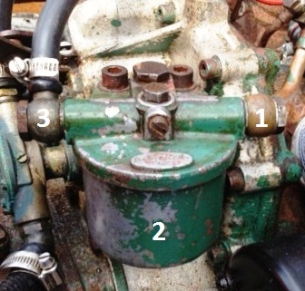 Vannutskiller, dieselfilter på eldre Volvo båtmotor